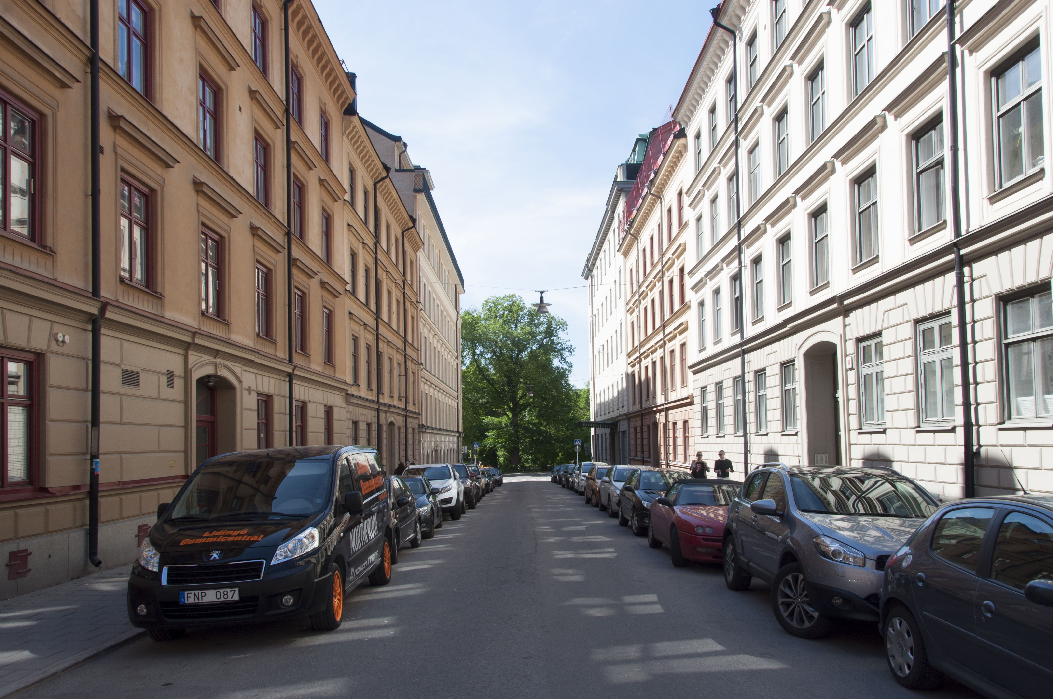 Cardellgatan västerut